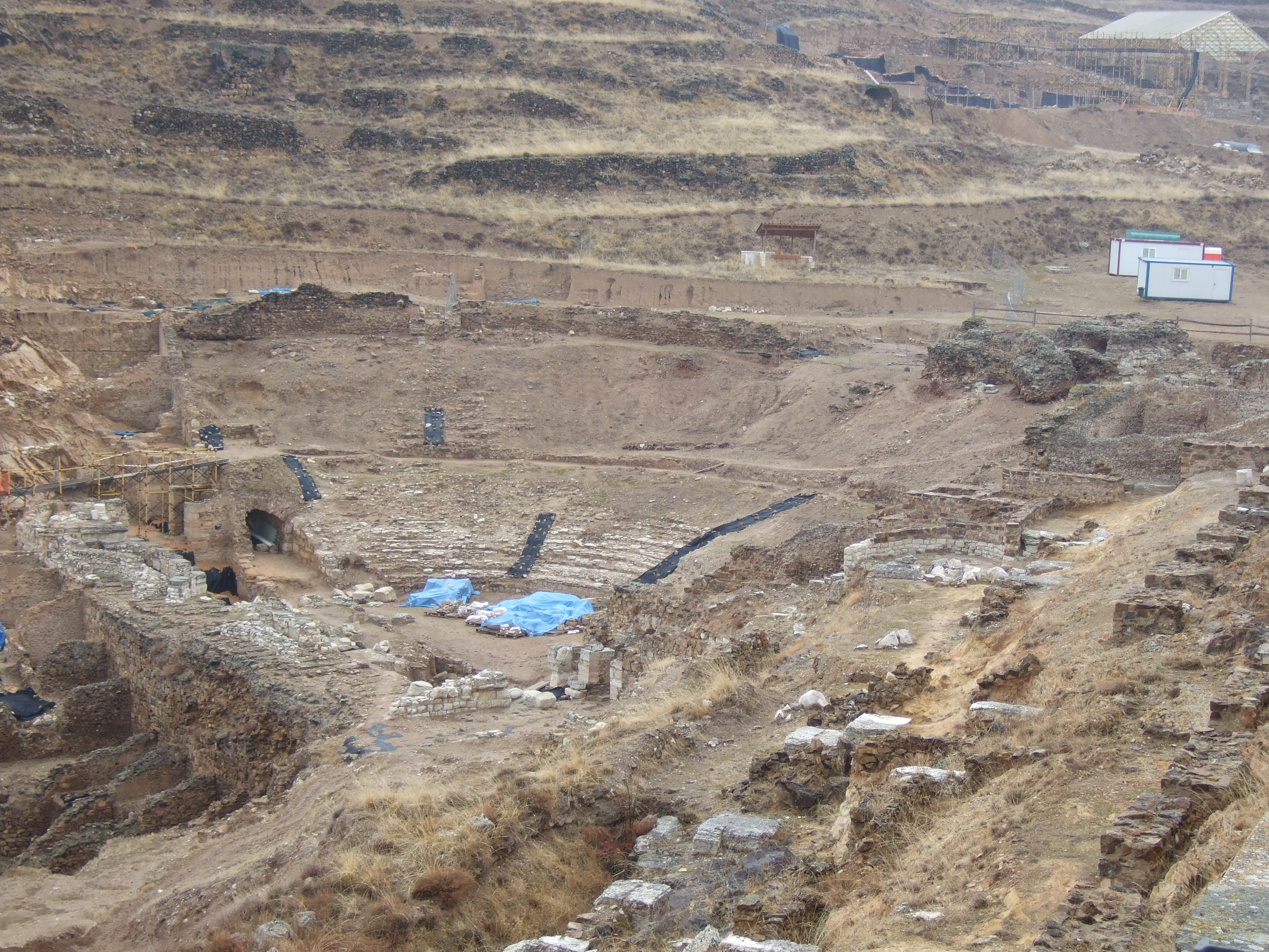 Teatro de Bílbilis, abandonadas a finales del siglo II ddC